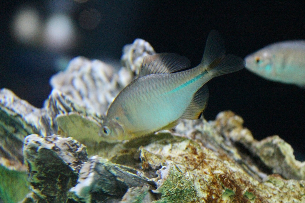 각시붕어(Korean rose bitterling)